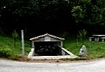 Fuente cerca del lugar de A Igrexa